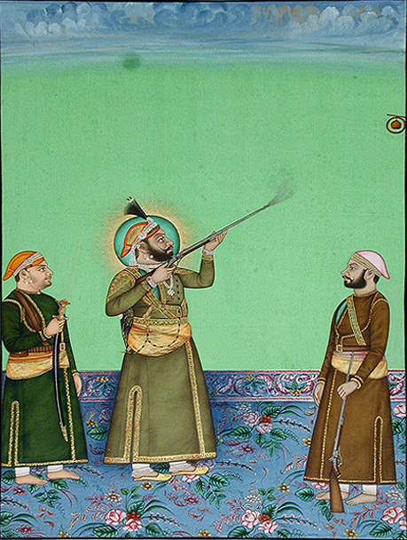 Maharana Sajjan Singh (1874-1884) shoots at an apple.